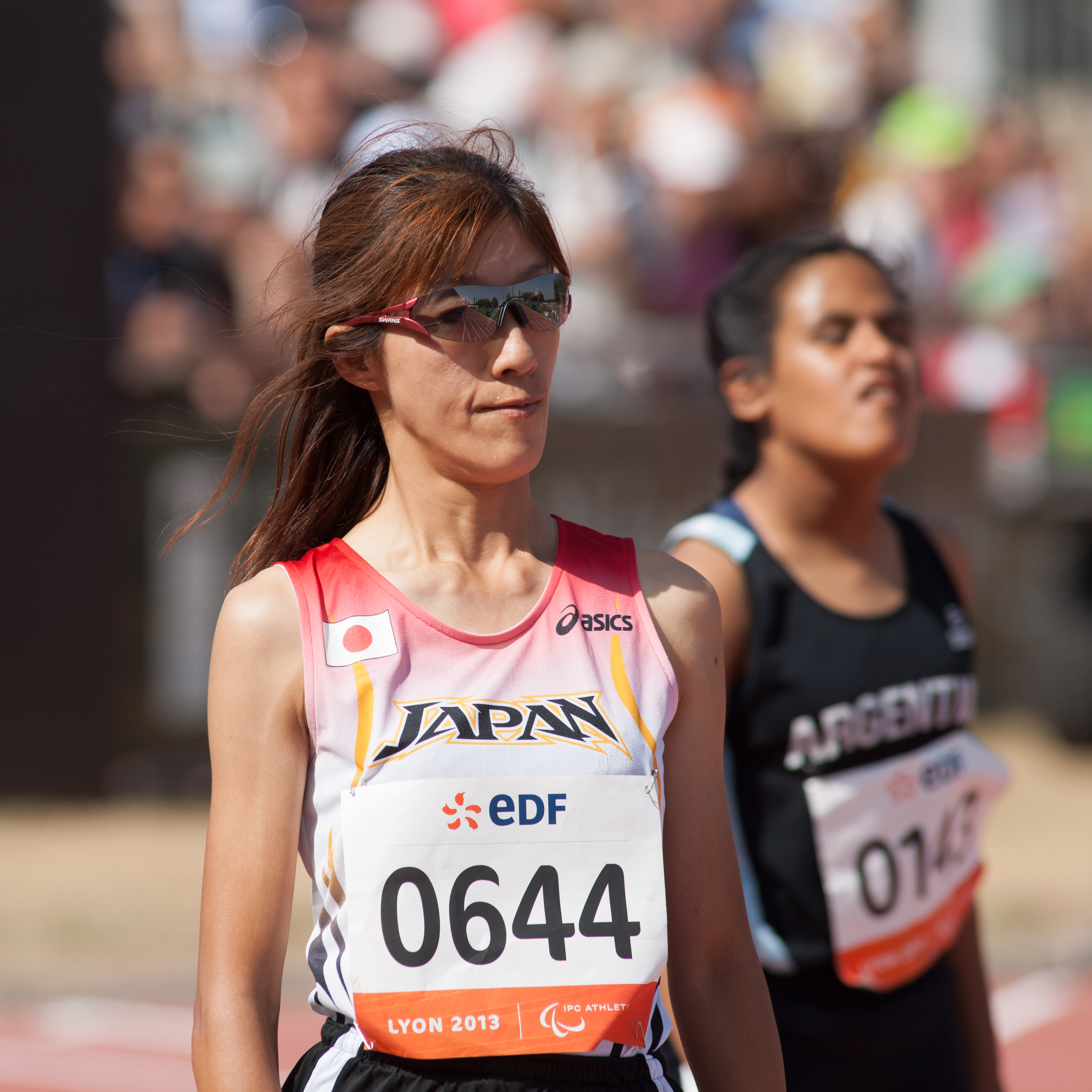 Championnats du monde d'athlétisme IPC 2013. 100 mètres féminin T36.